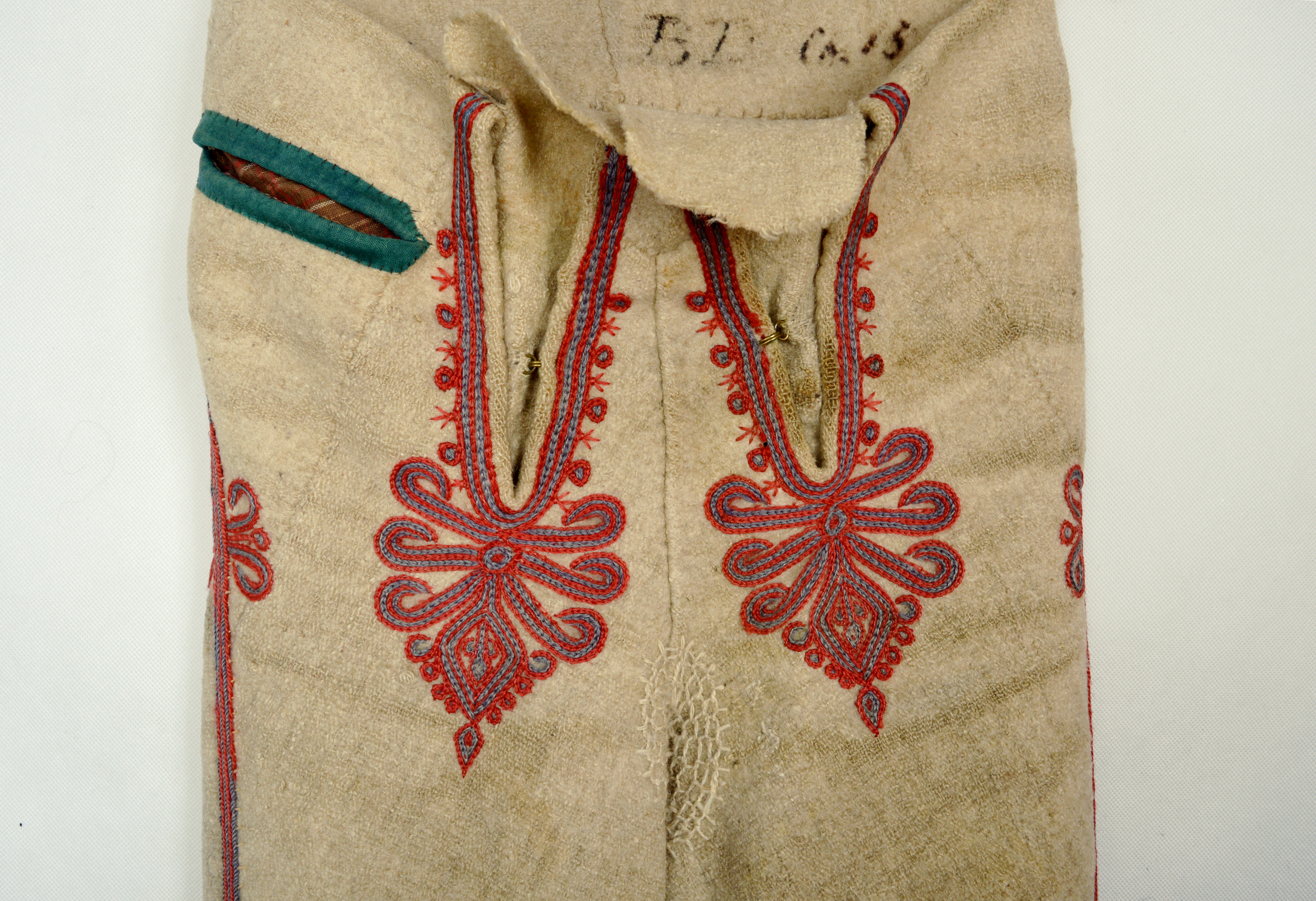 Spodnie podhalańskie, połowa XIX w. Kolekcja etnograficzna Muzeum Tatrzańskiego w Zakopanem.